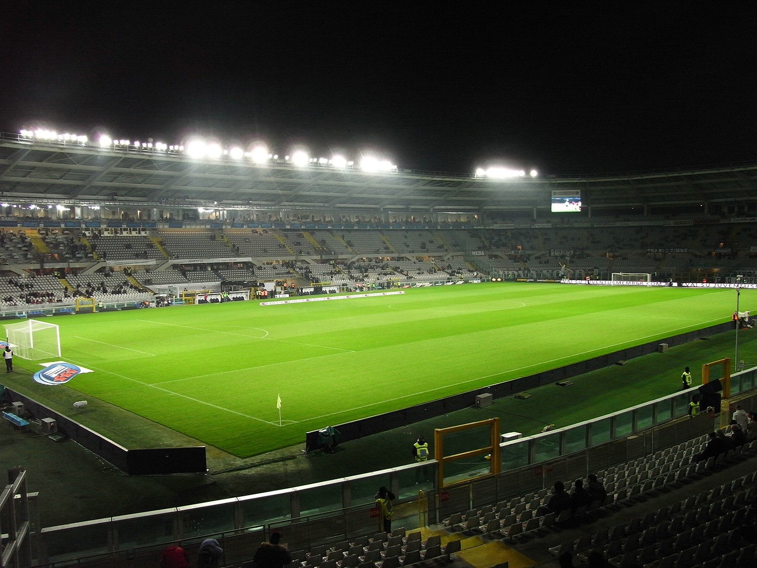 Stadio Olimpico di Torino in Turin, Italy, 2008.